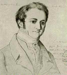 Porträt von Otto von Loeben